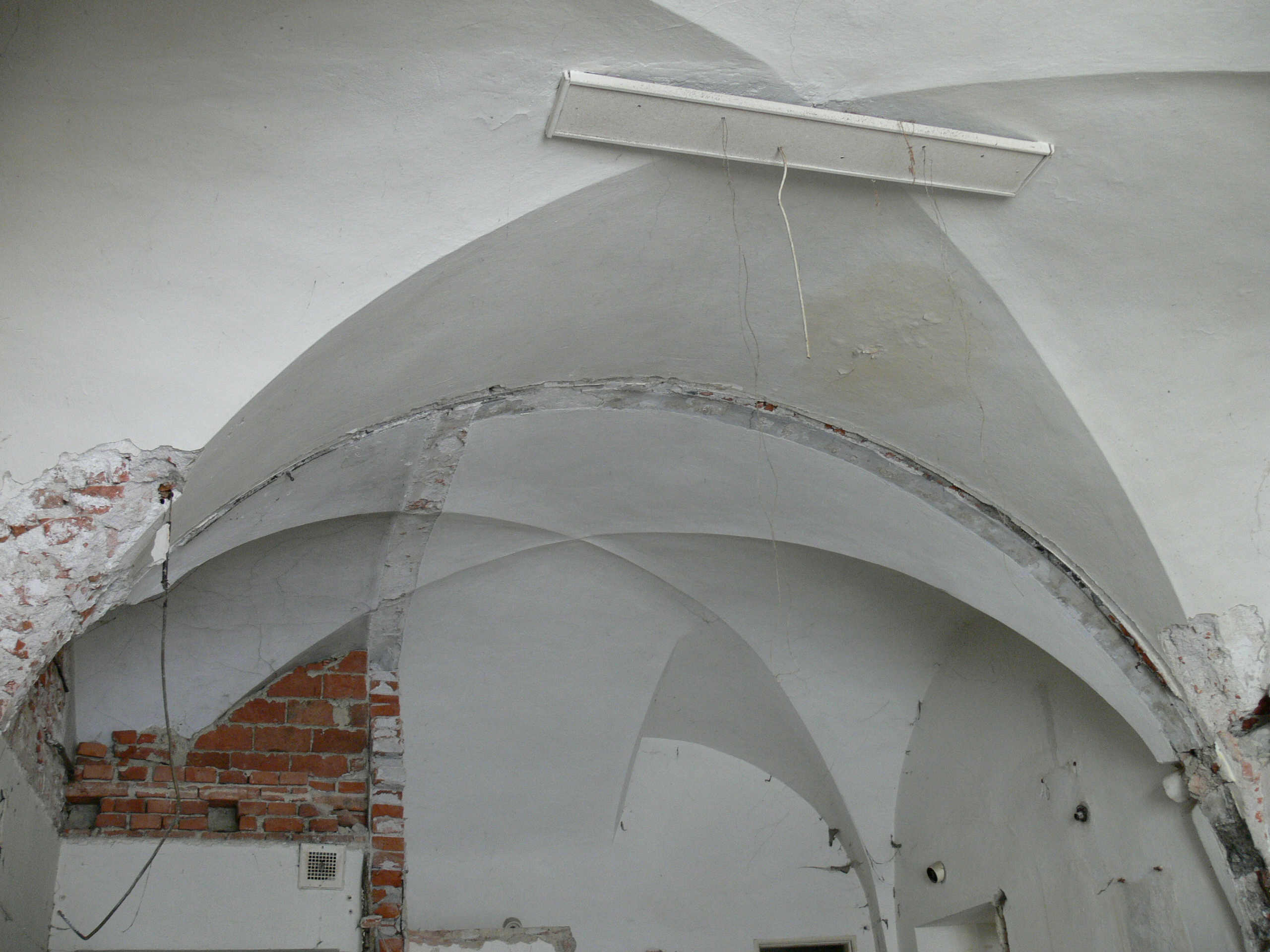 Přízemí